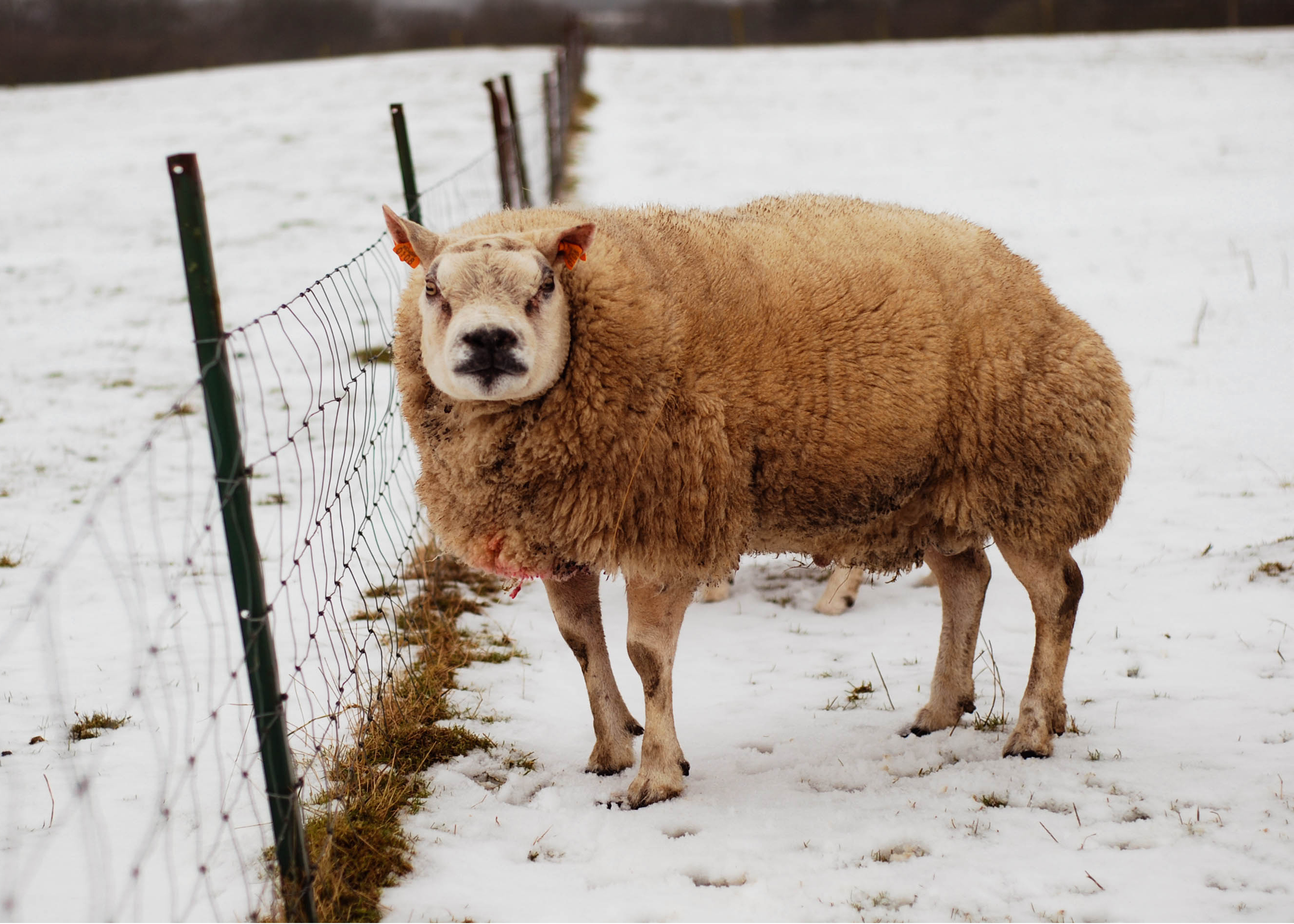 Un bélier Beltex belge de deux ans.